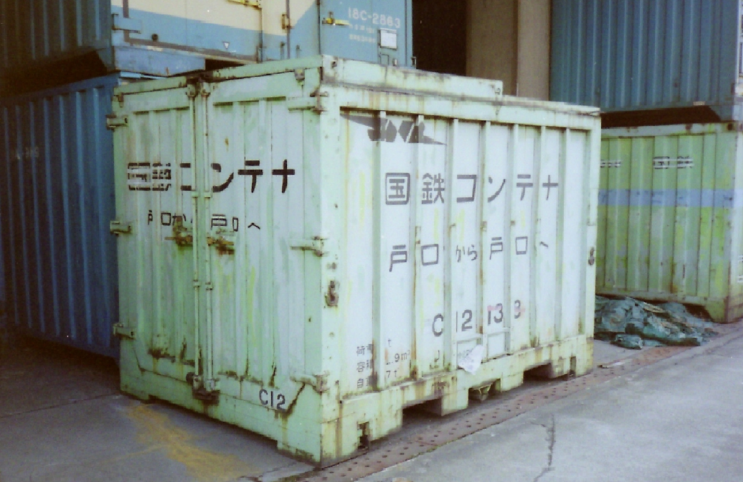 撮影地＝【大阪／元、梅田貨物駅】